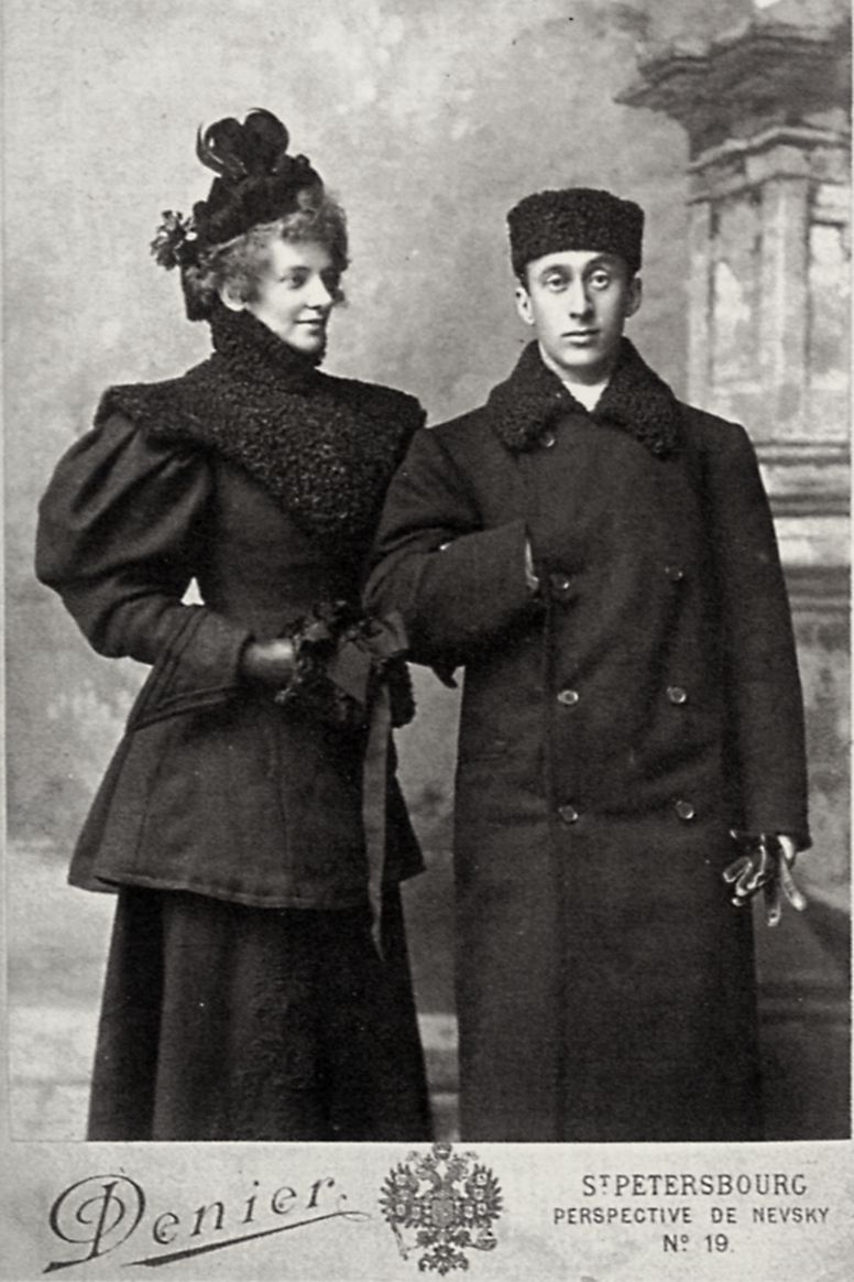 Denier, Andrej I.: Die russische Dichterin Zinaida Gippius in Begleitung des Kunsthistorikers und Balettkritikers A. Volynskij